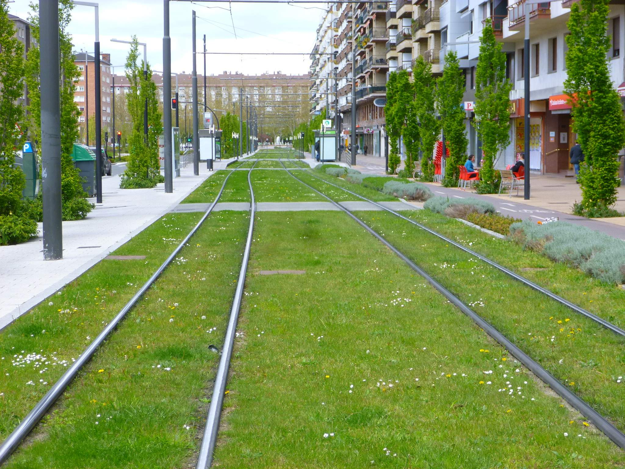 Vitoria - Avenida de Gasteiz